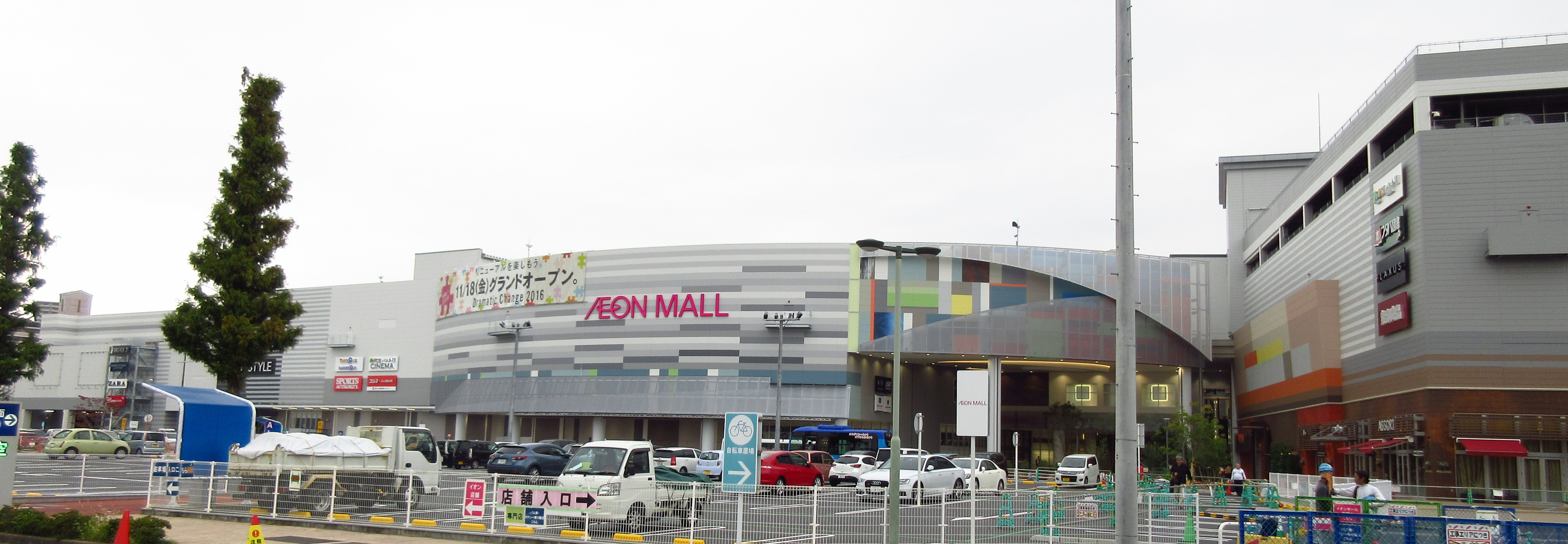 イオンモール広島府中の正面画像です。 増床リニューアルの増床棟が新たに建設されました。